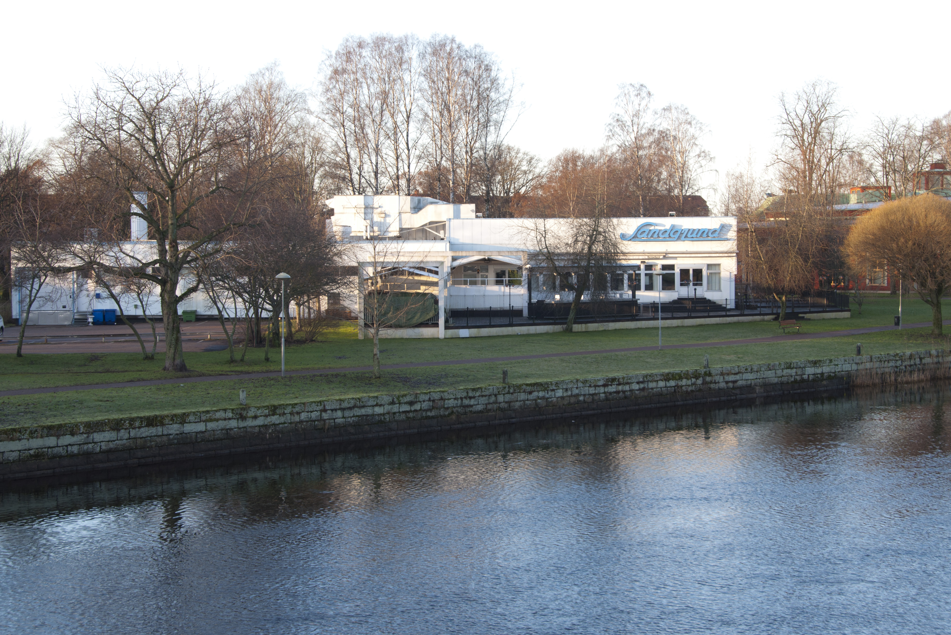 Restaurang Sandgrund. Byggnadsår 1960. Arkitekt Uno Asplund på Wästlunds arkitektkontor